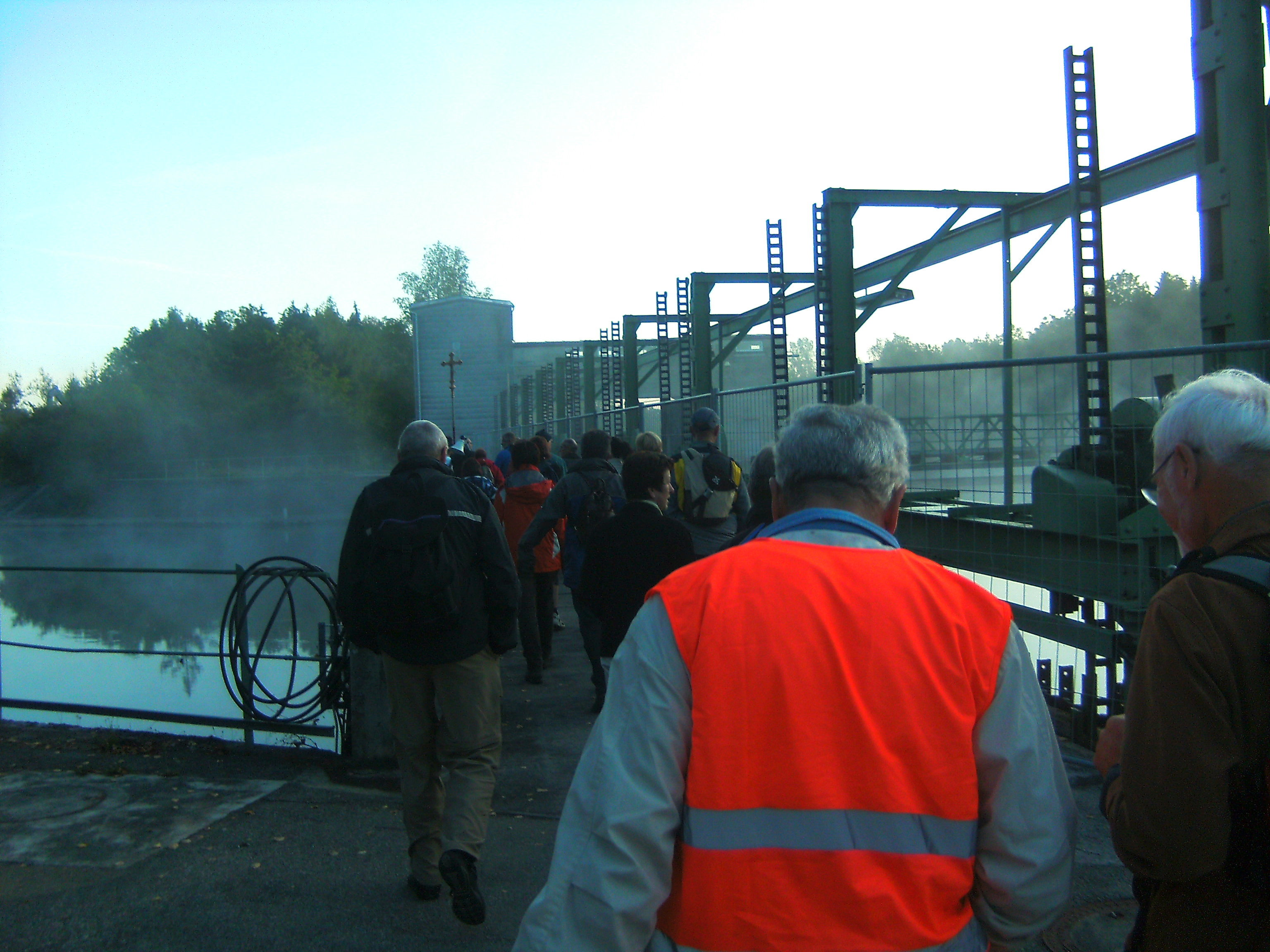 Wallfahrt Seelsorgeeinheit Rottal-Illertal nach Maria Steinbach beim überqueren der Iller bei Mooshausen im Landkreis Ravensburg - ganz vorne der Prozessionskreuzträger